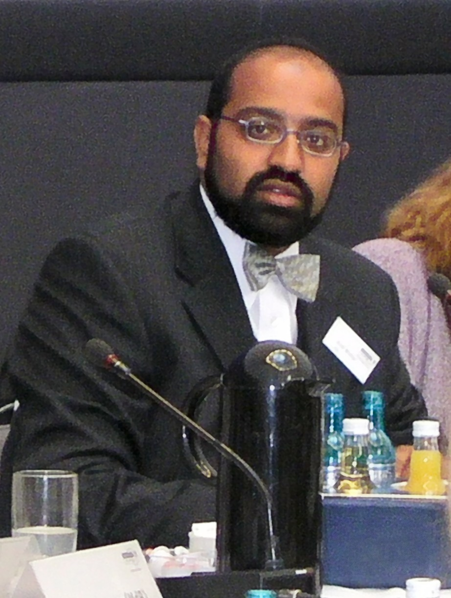 Josef Philip Winkler im Fraktionssitzungssaal von Bündnis 90/Die Grünen im Berliner Reichstag.